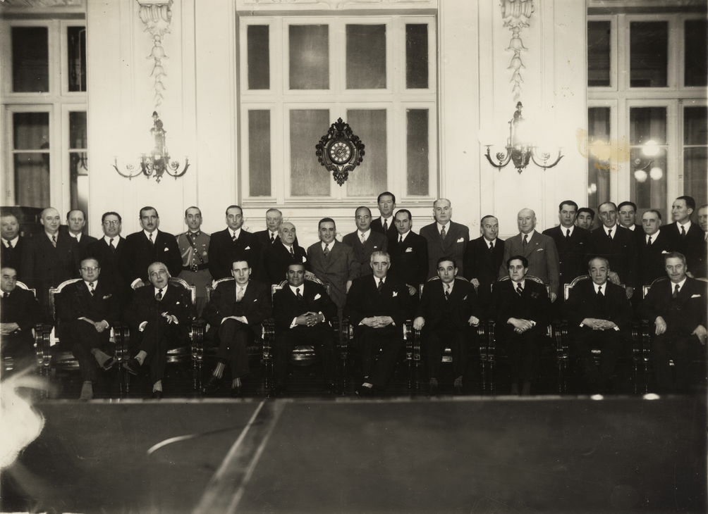 El Presidente de la República, don Juan Antonio Ríos, junto a miembros del Senado. Entre los senadores se encuentran de izq. a derecha: Sentados; Alfredo Duhalde, Raúl Morales Beltramí, Florencio Durán, Pdte. de la República, J.A. Ríos; Pedro Castelblanco, Julio Martínez Montt, Miguel Cruchaga Tocornal. De pie, Carlos Contreras Labarca, General Humberto Medina Parker, Marcelo Ruiz Solar (Secretario General de Gobierno), Elías Lafertte, Humberto Álvarez Suarez, Ernesto Barros Jarpa (Ministro de Relaciones Exteriores), Ulises Correa, Rudecindo Ortega, Marmaduke Grove Vallejos, Dr. Jirón, Francisco Urrejola, Dr. Eduardo Cruz-Coke.